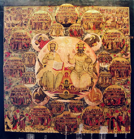 Троица Новозаветная с минеями. Ярославль. Конец XVII в. Икона из церкви Феодоровской Божией Матери в Ярославле. Бог Сын и Бог Отец в свете Бога Святого Духа - на престолах в окружении сил небесных. Окружают Троицу сферы с изображениями символов евангелистов и ангельских чинов, а далее - двенадцать миней (месячников), по числу месяцев в году с изображениями в них святых, особо почитаемых в этом месяце. Дальше от центра иконы и вне минейных сфер изображаются разные земли и народы, поклоняющиеся Святой Троице. Икона показывает и мироустройство, но очень необычным, непривычным способом: не земля окружена небом, а наоборот, от небес во все стороны лежит земля. Троица - центр мироздания, Ей подчинены силы небесные, святые и православные народы.